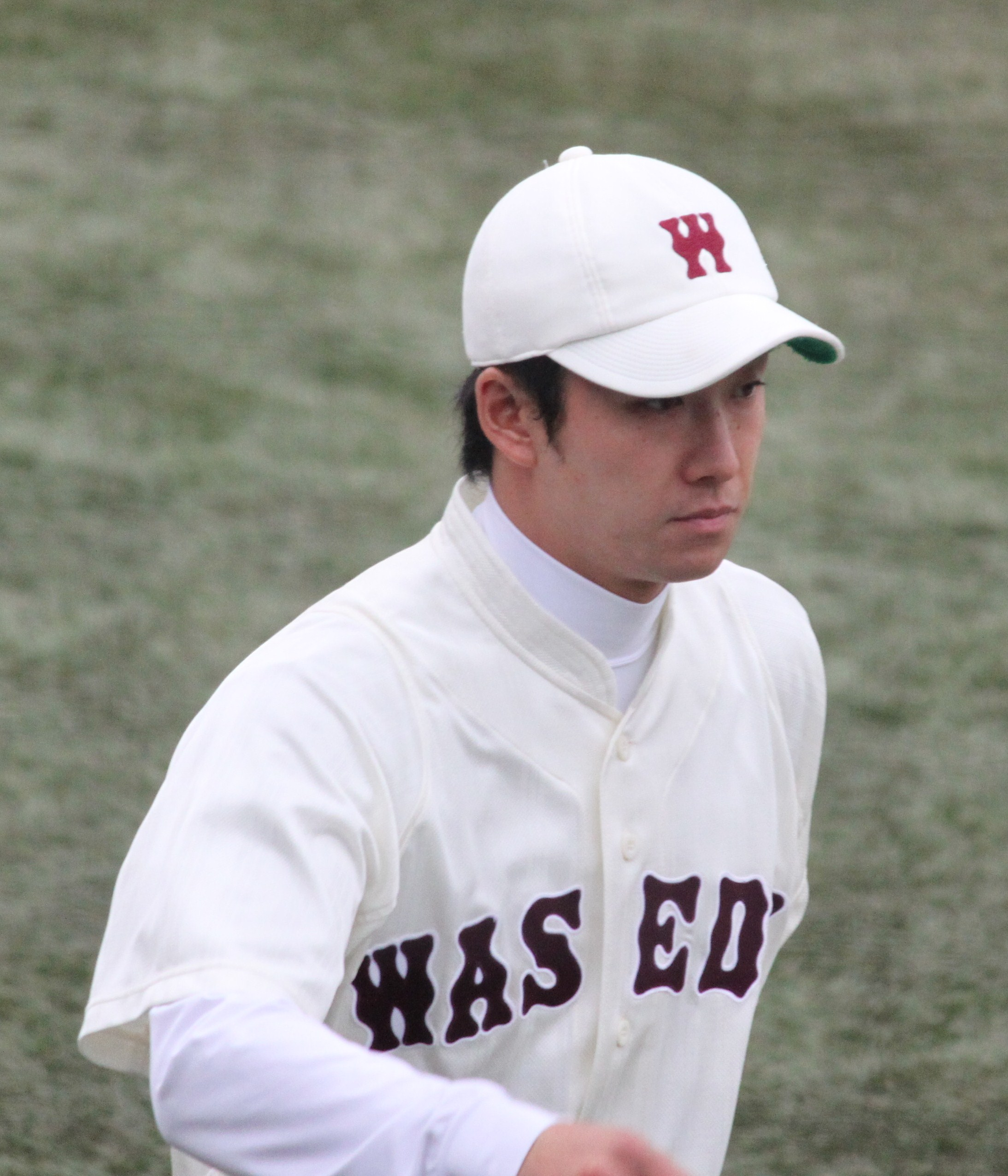 第４１回明治神宮野球大会：愛知学院大に勝利し勝利投手となった斎藤投手。